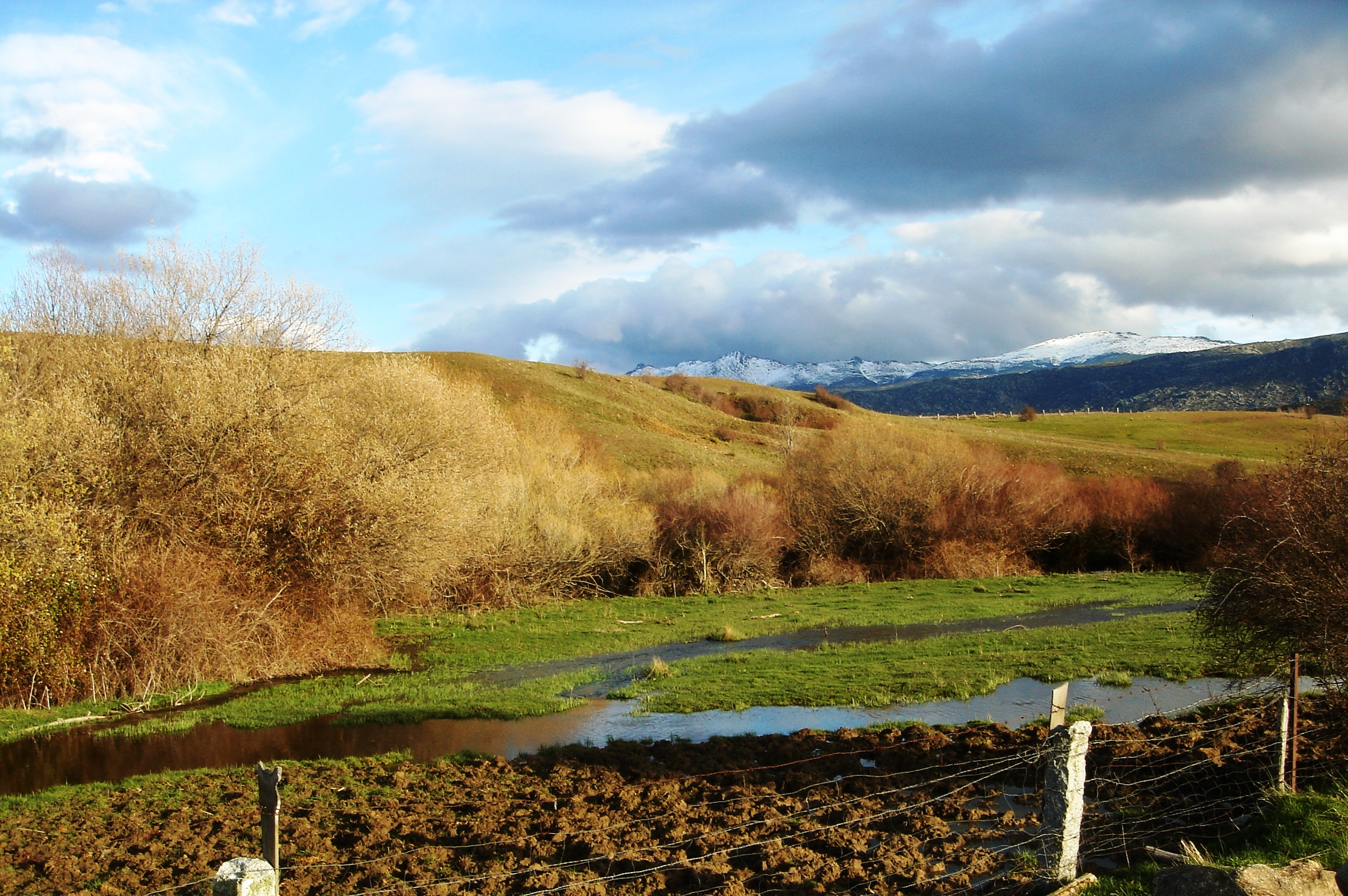 Río Blasco o Paradillo, afluente del río Adaja, La Torre, Ávila, España. This is a photography of a Special Area of Conservation in Spain with the ID: ES4180081. Natura2000 entry, EEA entry